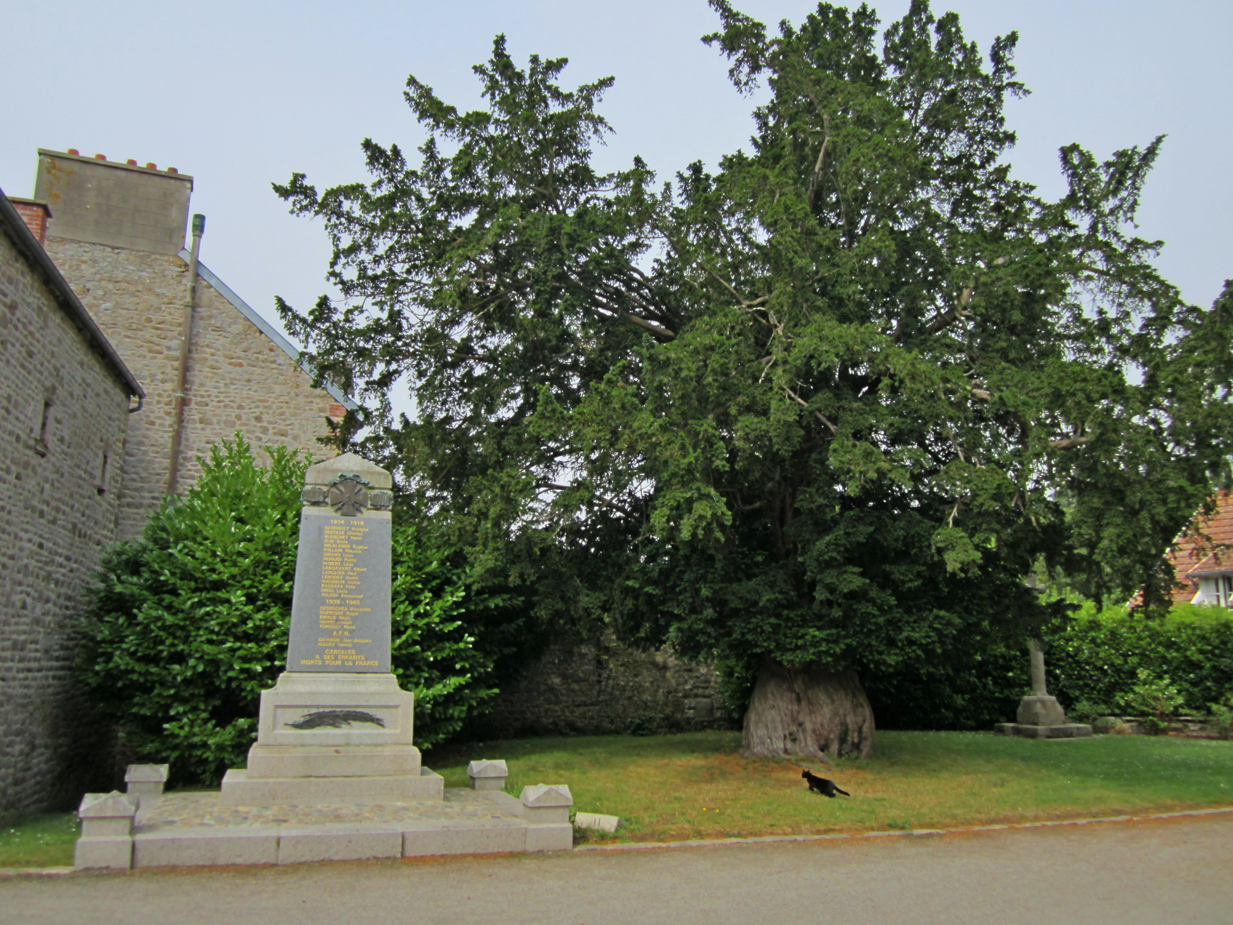 Église Saint-Vigor de Carolles, Manche